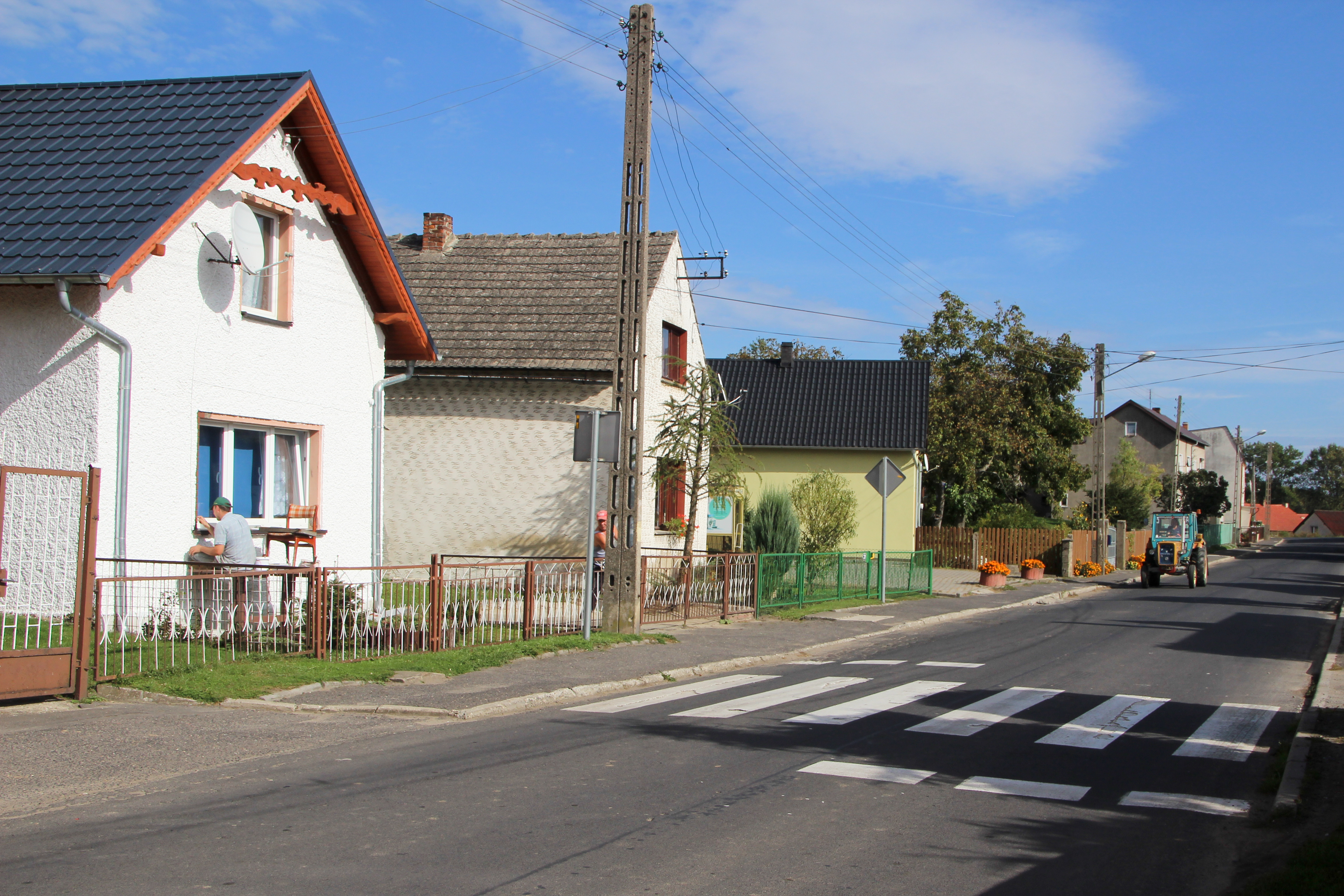 Wronin - wieś w Polsce położona w województwie opolskim, w powiecie kędzierzyńsko-kozielskim, w gminie Polska Cerekiew.